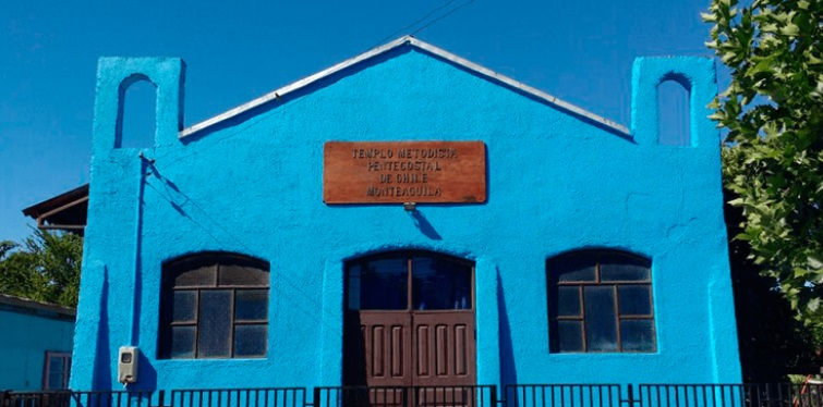 Iglesia evangélica en Monte Águila